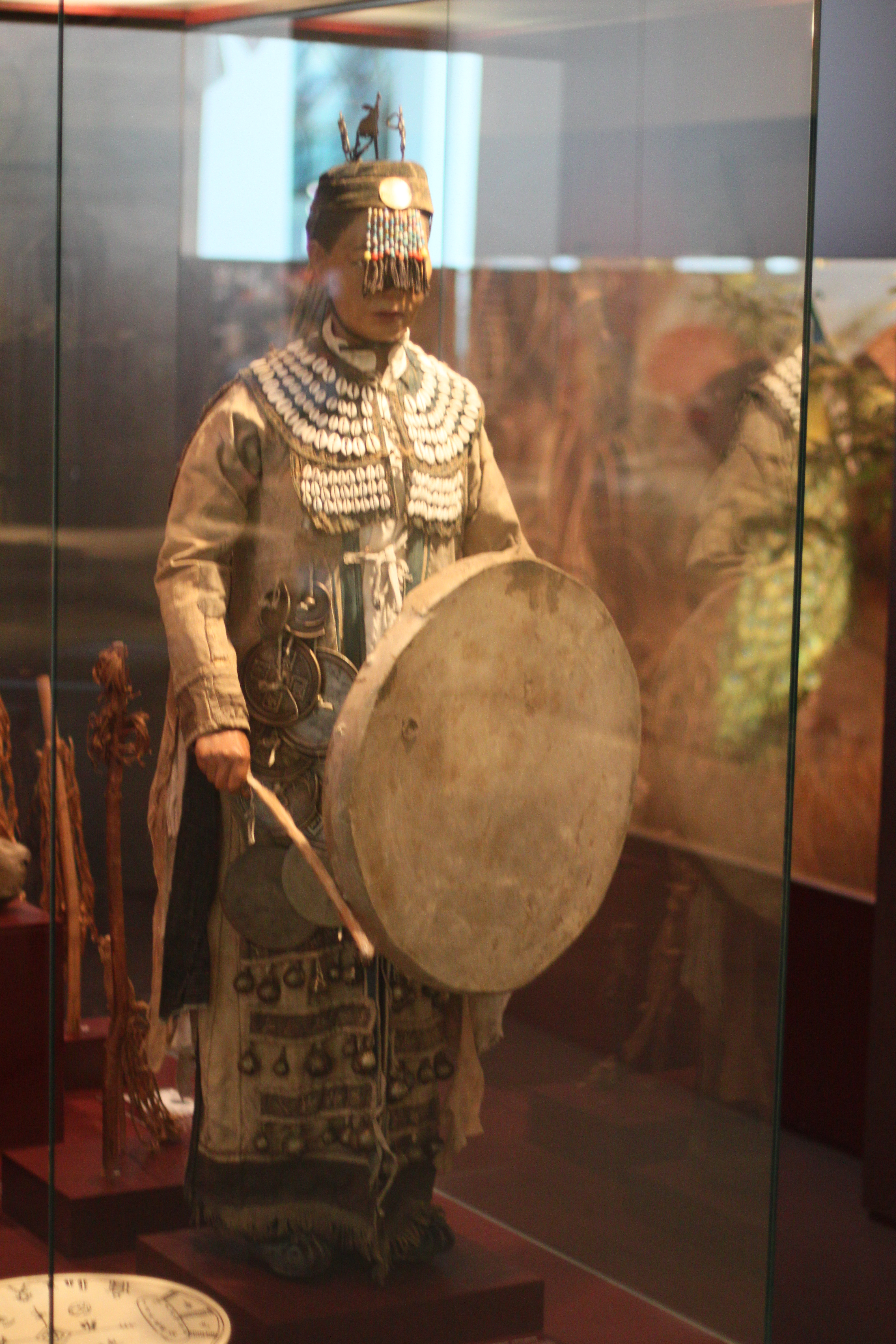 Schamanin der Mergen-Oroqen; Gewand und Ausrüstung einer Schamanin der Mergen-Oroqen; erworben 1928 vom Dresdener Asienforscher Walter Stützner von den Oroqen im Bezirk Mergen in der Mandschurei (heute Volksrepublik China); Kaurischnecken am Kragen; Bronzespiegel und Bronzeglöckchen; Metallstreifen und Rasselringen besitzen starke Heil- und Abwehrkräfte; Die Schamanin ruft ihre Hilfsgeister an und führt die Trance herbei; Hilfsgeister Vogel und Renntier (Kappe); Perlenschleier vor Stirn und Augen; im Überseemuseum